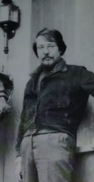 Piero Cerato1976